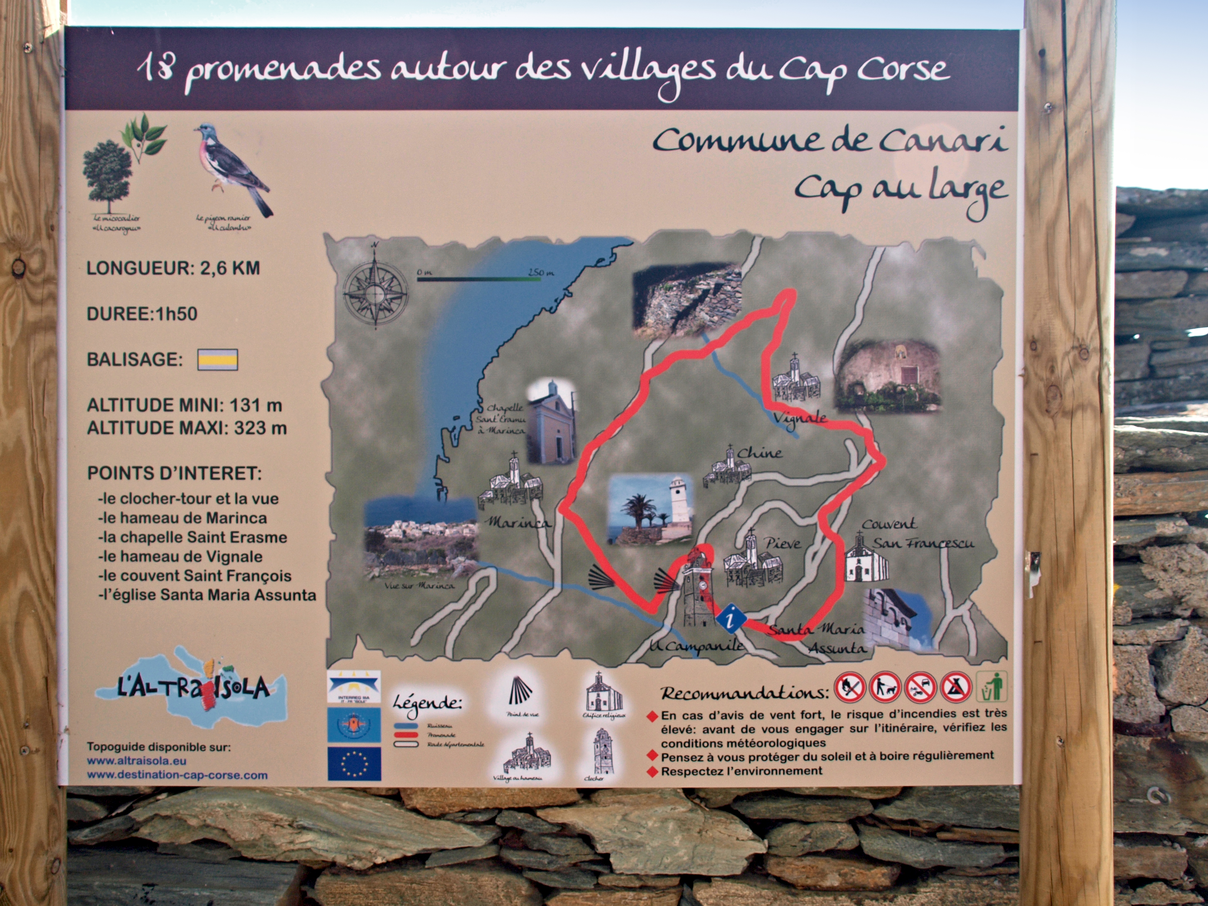 Canari (Corsica) - Panneau Promenade